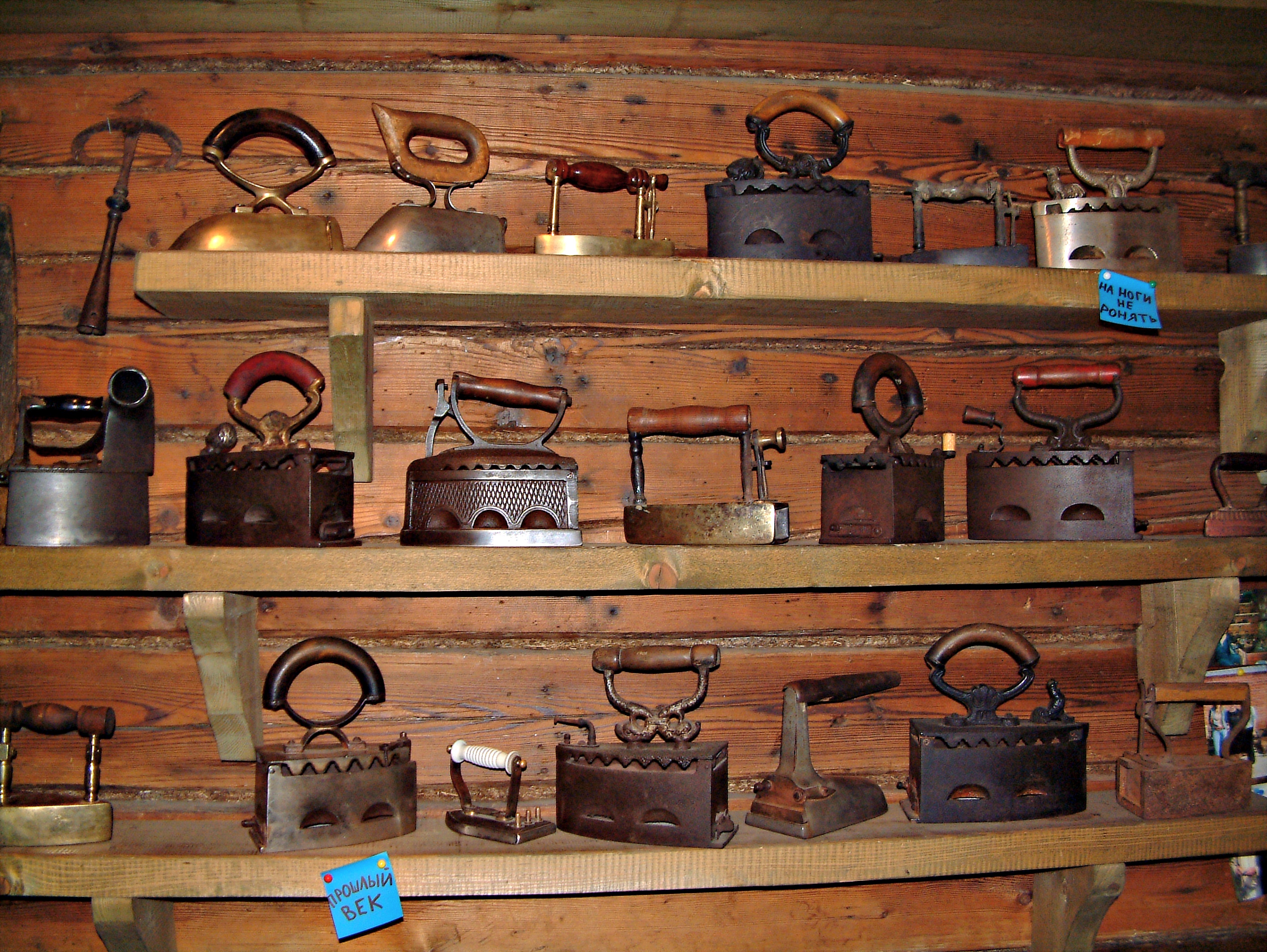 Музей утюга. Переславль-Залесский